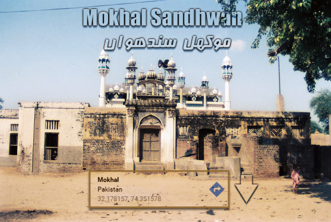 یہ تصویر موکھل سندھواں کی ہے۔اس تصویر میں گورنمنٹ پرائمری سکول اور جامع مسجد واضع ہے۔